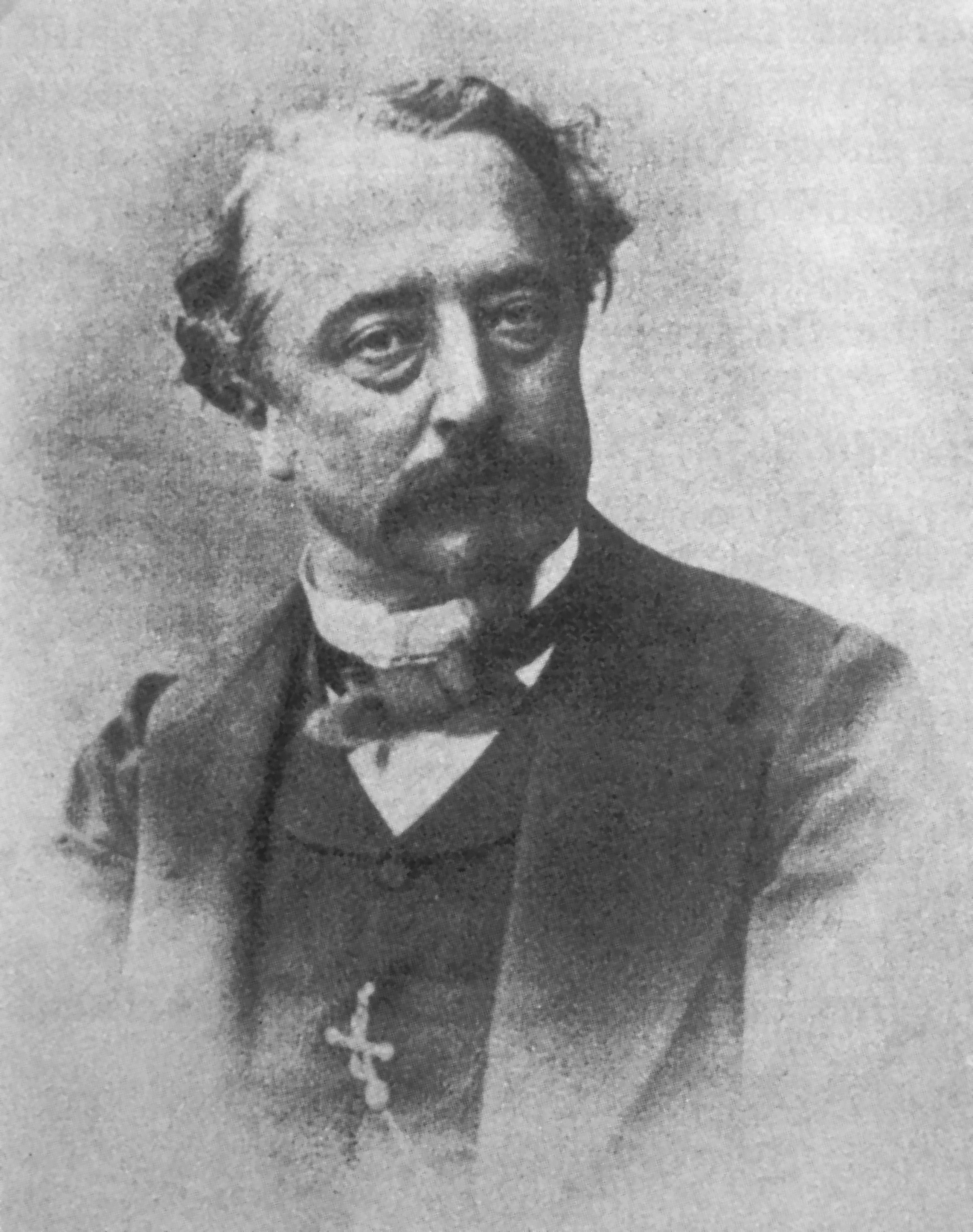 Dominique Jacomet vers 1860. Photographie de Philippe Viron. Dominique Jacomet était commissaire de police de Lourdes au temps des apparitions à Bernadette Soubirous l'année 1858.